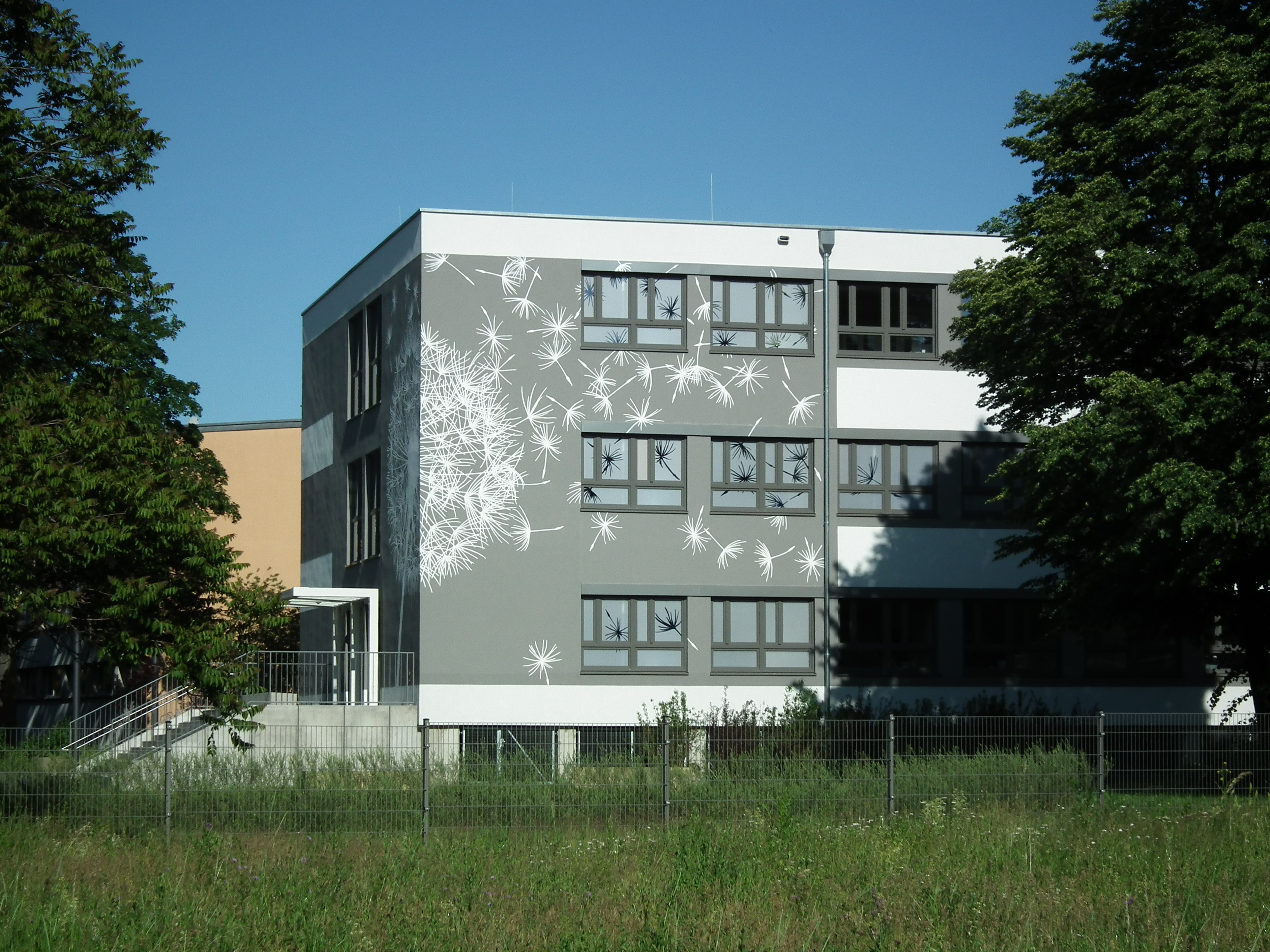 Schulgebäude Terrassenufer 15, Erweiterungs-Containerbau, Ausweichquartier für das Gymnasium Dresden-Plauen